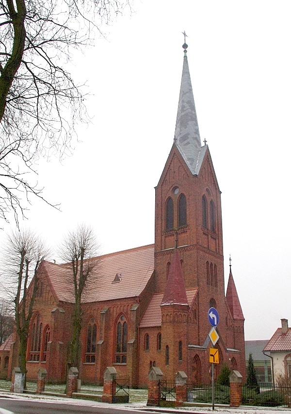 Gryfice, kościół ewangelicki, ob. prawosławny p.w. Zaśnięcia NMP, 2 poł. XIX